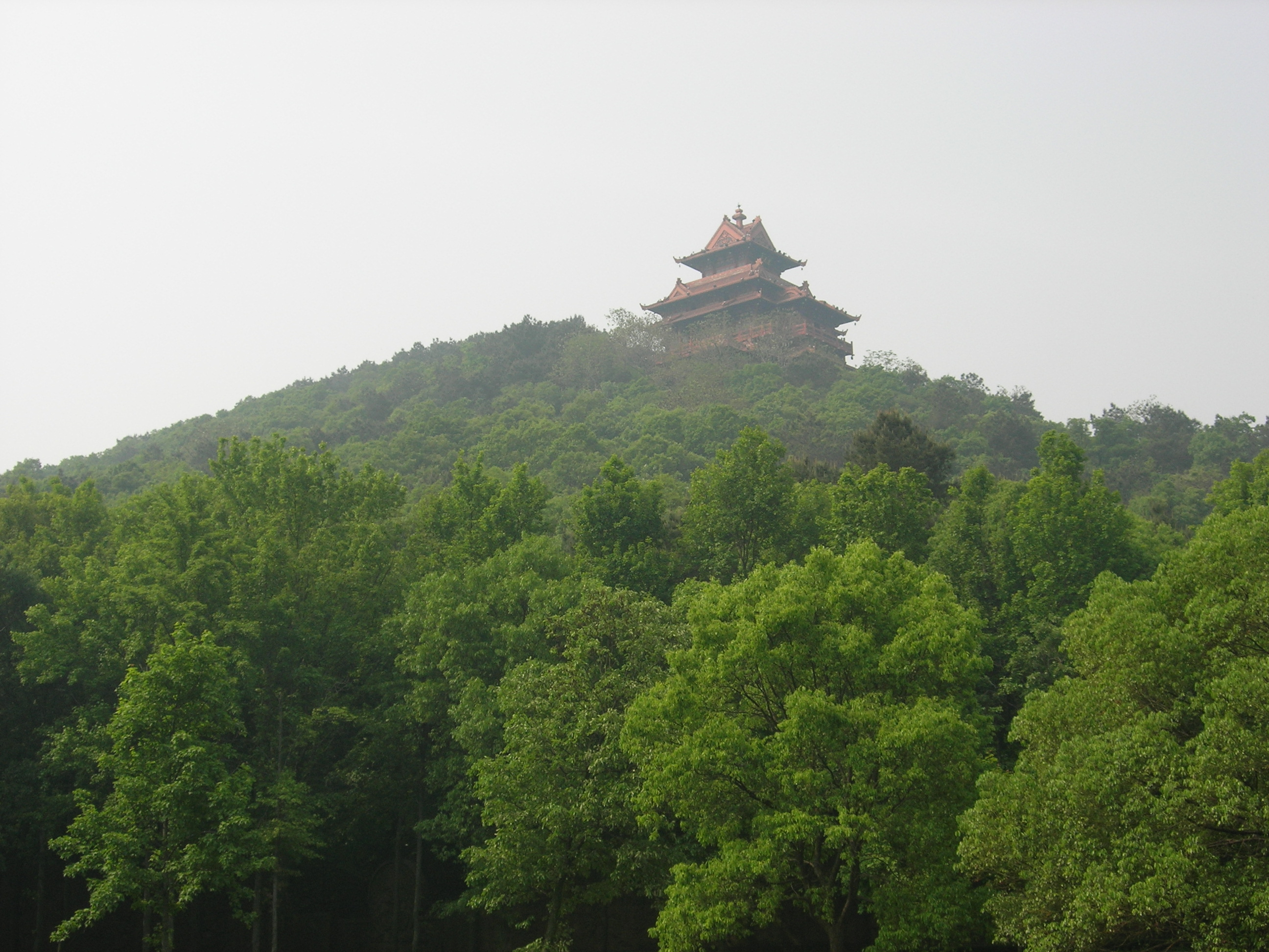 磨山楚天台